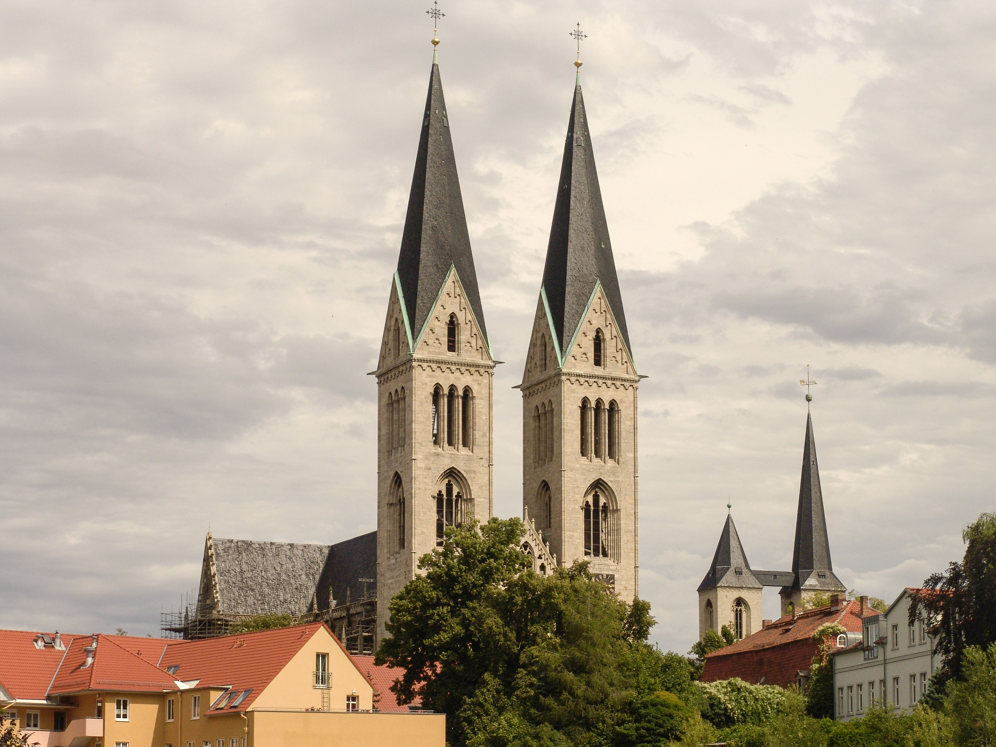 Halberstädter Dom, Exterior